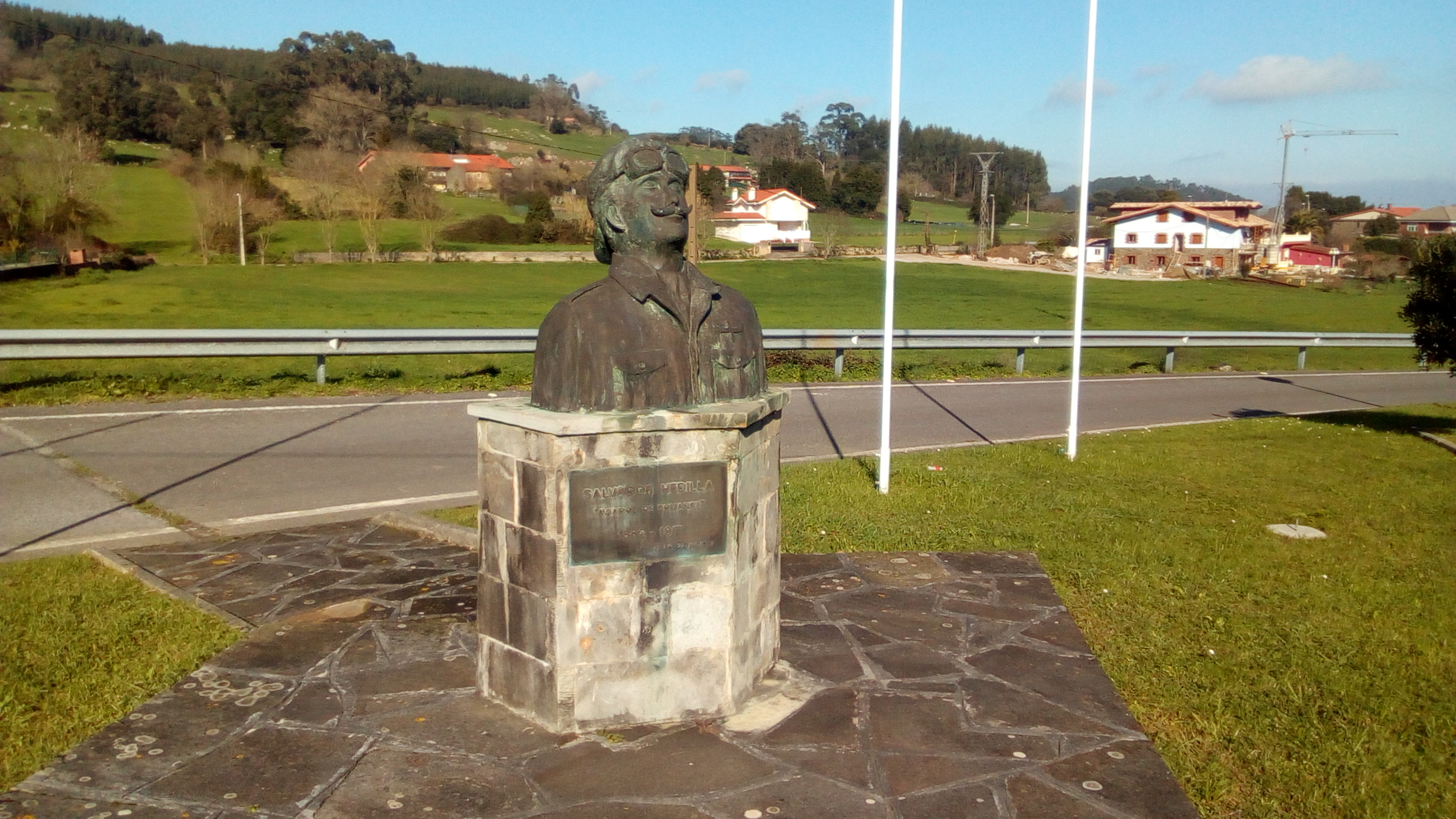 Monumento. Busto Salvador Hedilla (Castillo)